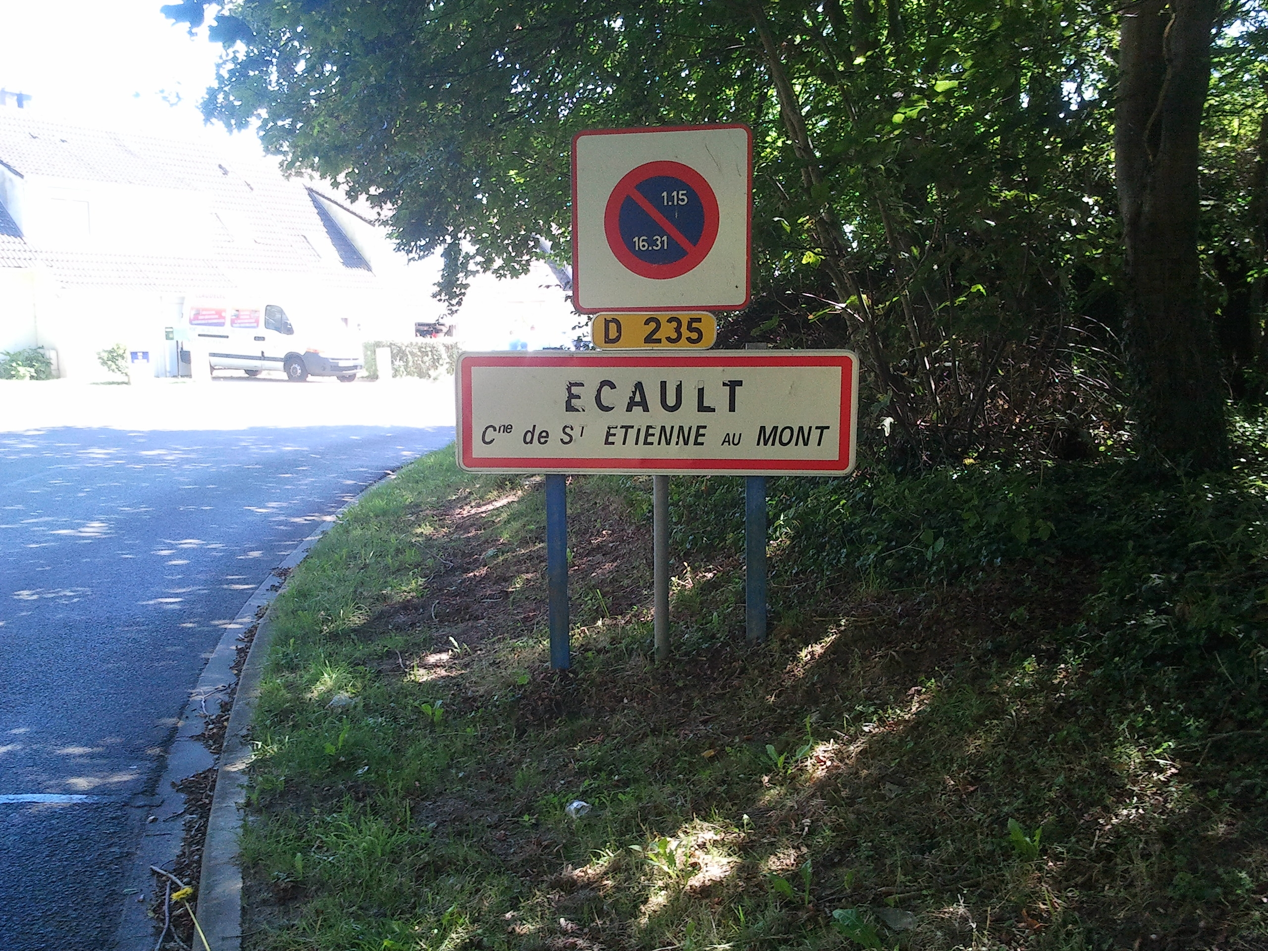 Panneau d'entrée du village d'Écault (Pas-de-Calais)